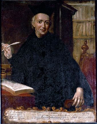 Retrato de Baltasar Gracián que se conserva en Graus, restaurado. El escritor fue destinado al colegio jesuita de Graus a comienzos de 1658 como represalia por la publicación de las tres partes del Criticón (1651, 1653, 1657). El retrato estuvo en el colegio grausino de la Compañía de Jesús, anexo a la iglesia de los jesuitas, que fue desmantelado en los años 1960. Sin embargo el retrato había sido trasladado anteriormente a la iglesia parroquial de San Miguel de Graus.